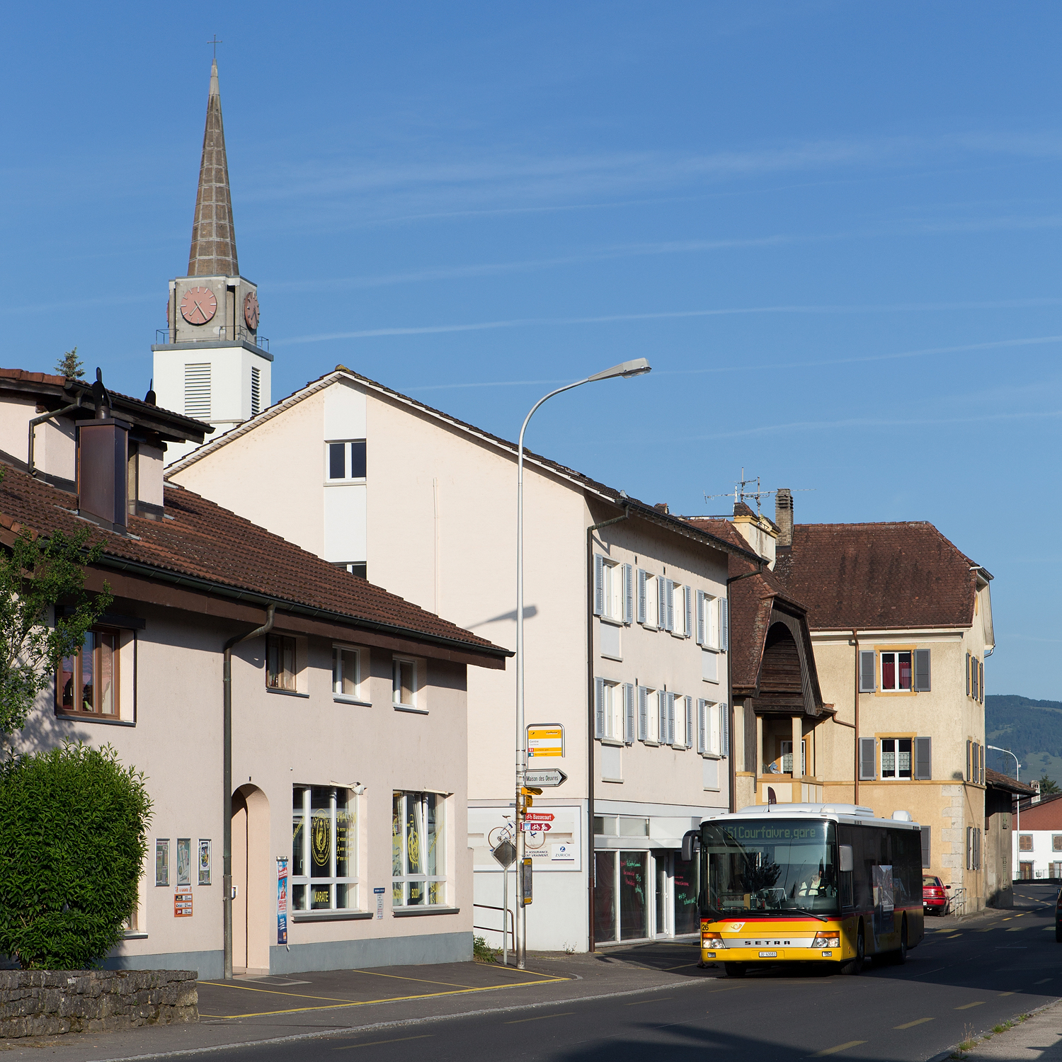 Zentrum von Courfaivre (JU)